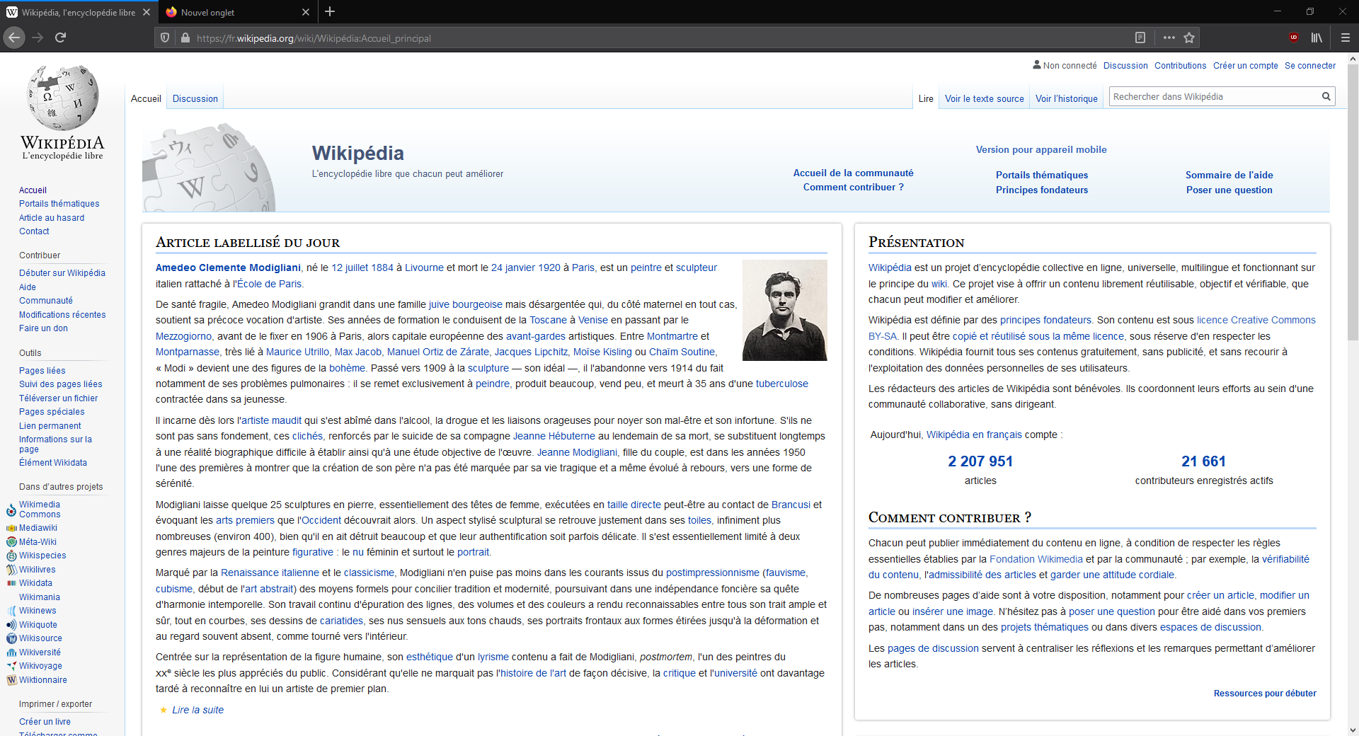 Mozilla Firefox 75 - Page d’accueil Wikipédia